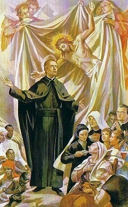 Foto da me scattata, raffigura il Beato Giacomo Cusmano, tela di Aronne del Vecchio, Cattedrale di Palermo